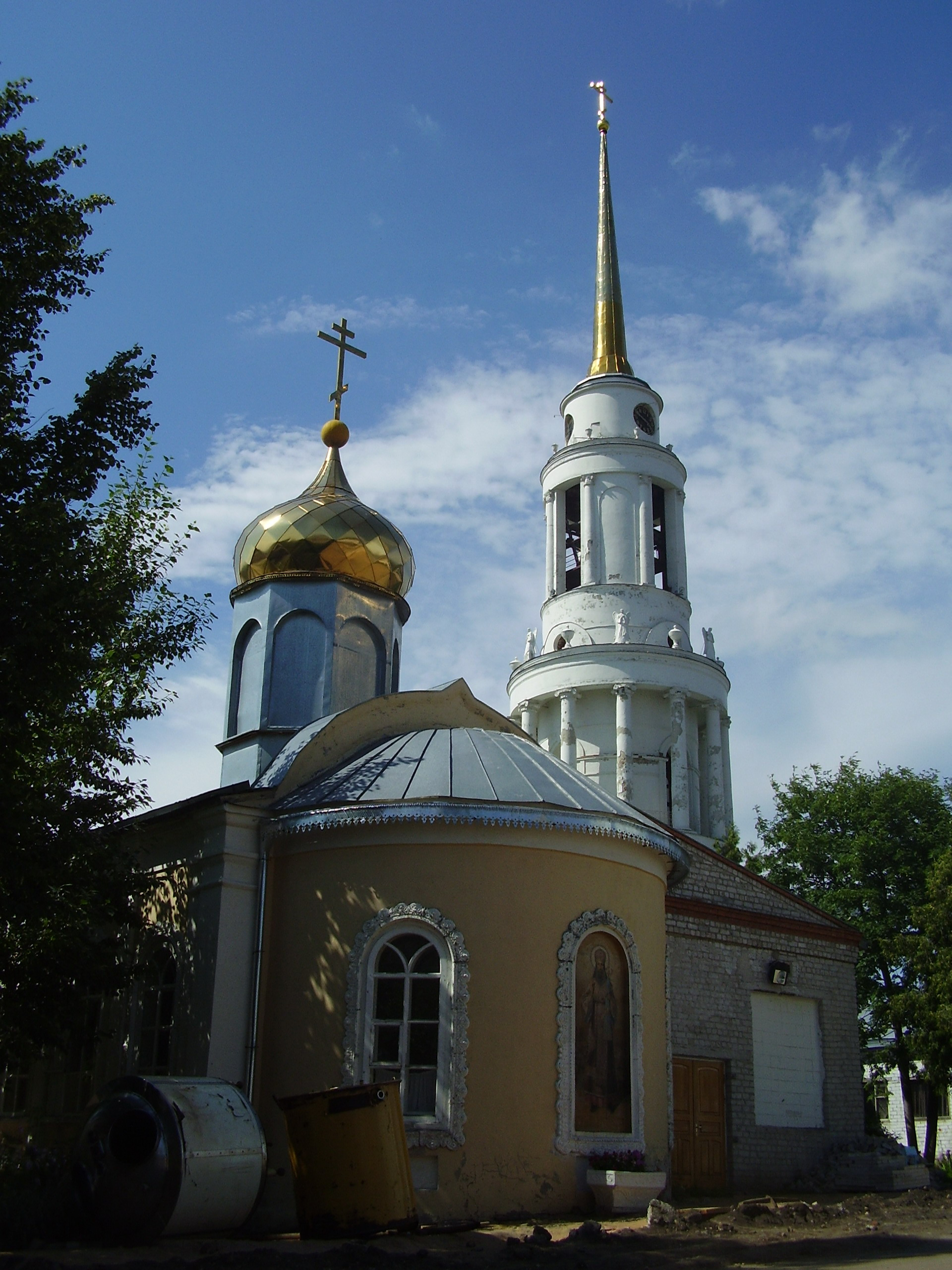 Свято-Тихоновский храм на месте бывшей келии Тихона Задонского,территория Рождество-Богородицкого(Свято-Тихоновского) монастыря